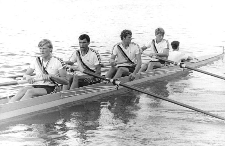 Schmeling, Niesecke, Eichwurzel, Klawonn, Reiher ADN-ZB Grimm 24.7.88 Berlin: DDR-Meisterschaften im Rudern in Berlin-Grünau- In der Besetzung K. Schmeling, B. Niesecke, B. Eichwurzel, T. Klawonn und H. Reiher gewann die Mannschaft von Dynamo Potsdam die Entscheidung Vierer mit Steuermann.